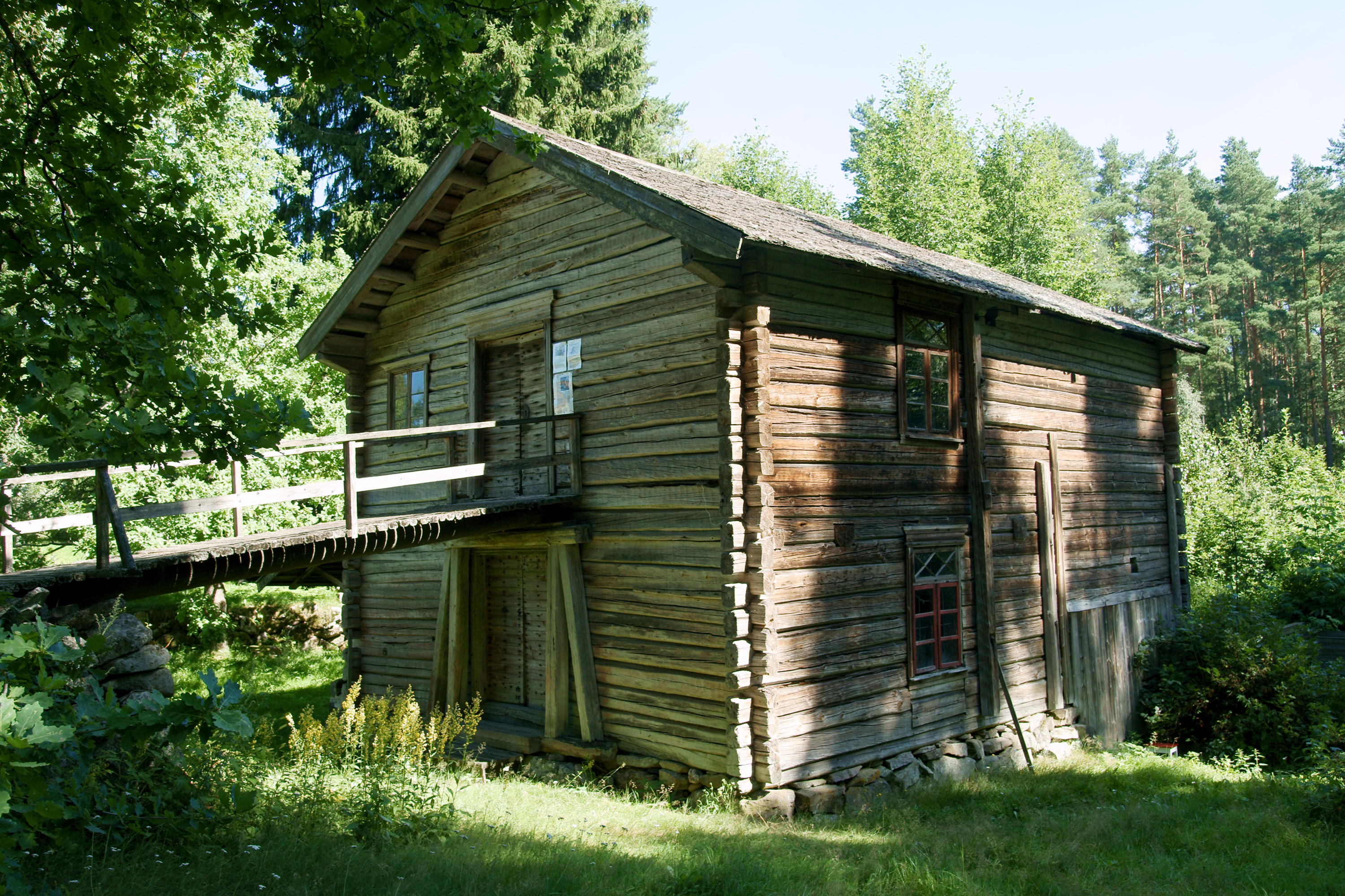 Kuninkaanlähteen vanha vesimylly. Kankaanpään kyläyhdistys on peruskorjannut myllyn vuonna 1990 ja sen vesi johdetaan nykyään Köyliön kalanviljelylaitoksen tarpeisiin. Aikaisemmin yhteydessä on myös toiminut pärehöylä.